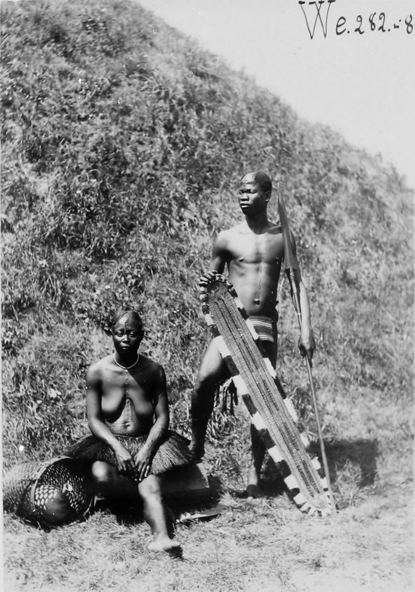 Couple Bangala, 45 phot. de types d'indigènes du Congo belge.